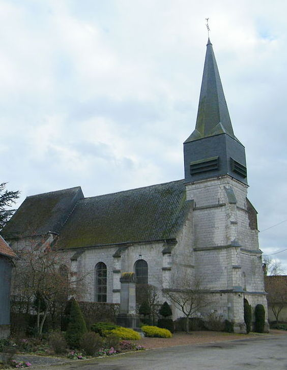 Maizicourt, Somme, fr, l'église Notre-Dame-de-l'Assomption.